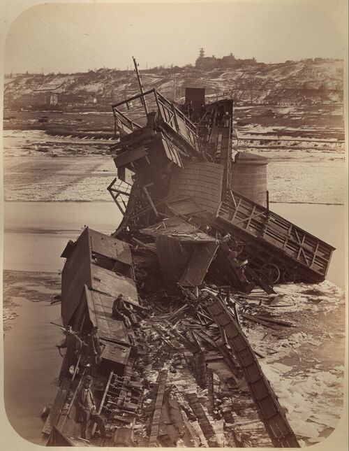 Lemberg-Czernowitzer Eisenbahn: Einsturz der Pruth-Brücke bei Czernowitz, 4. März 1868. Samt Güterzugwagen.